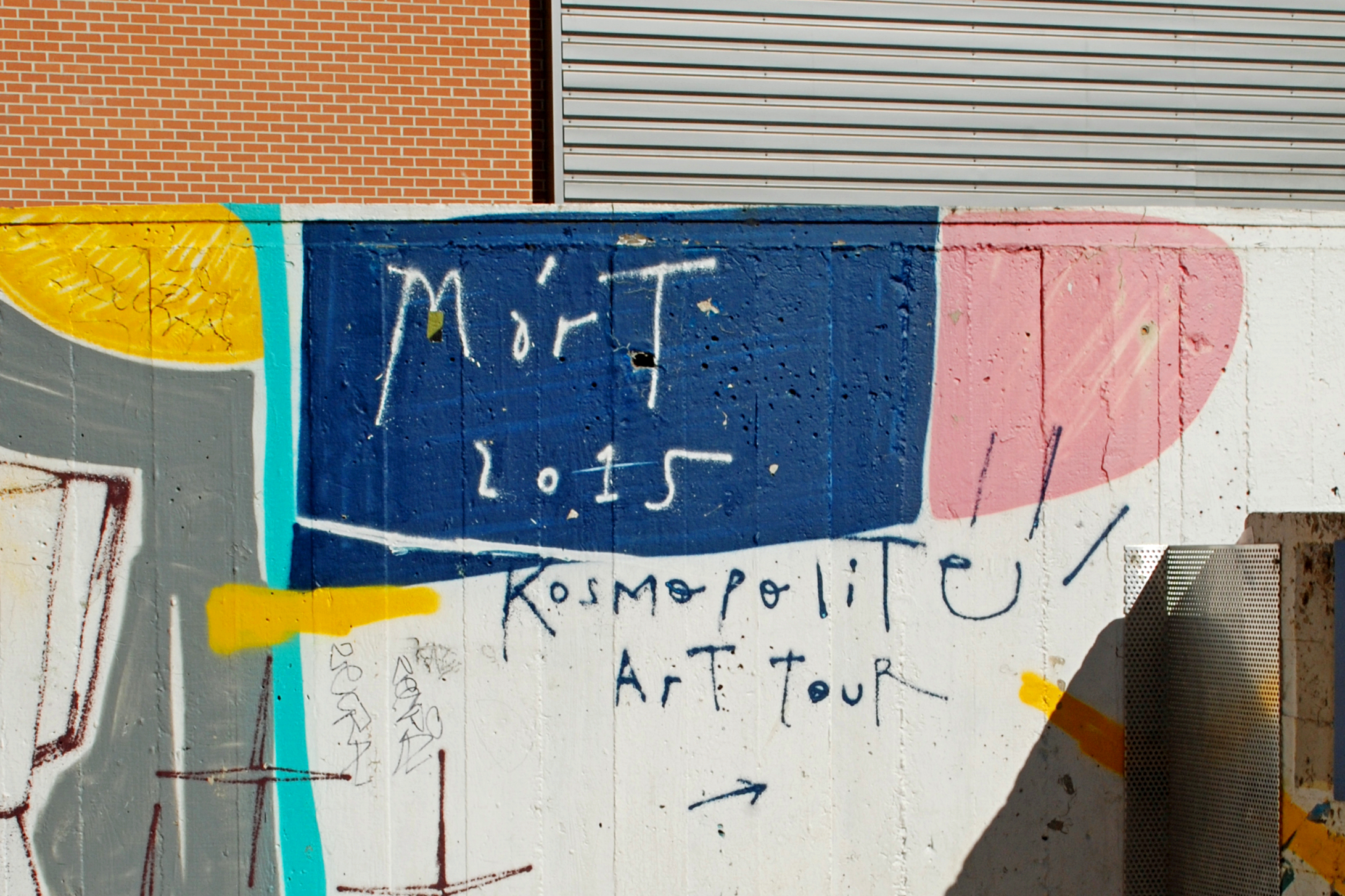 Belgique - Louvain-la-Neuve - Gare - parapet - Fresque de Mart Aire (Kosmopolite Art Tour 2015 à Louvain-la-Neuve)